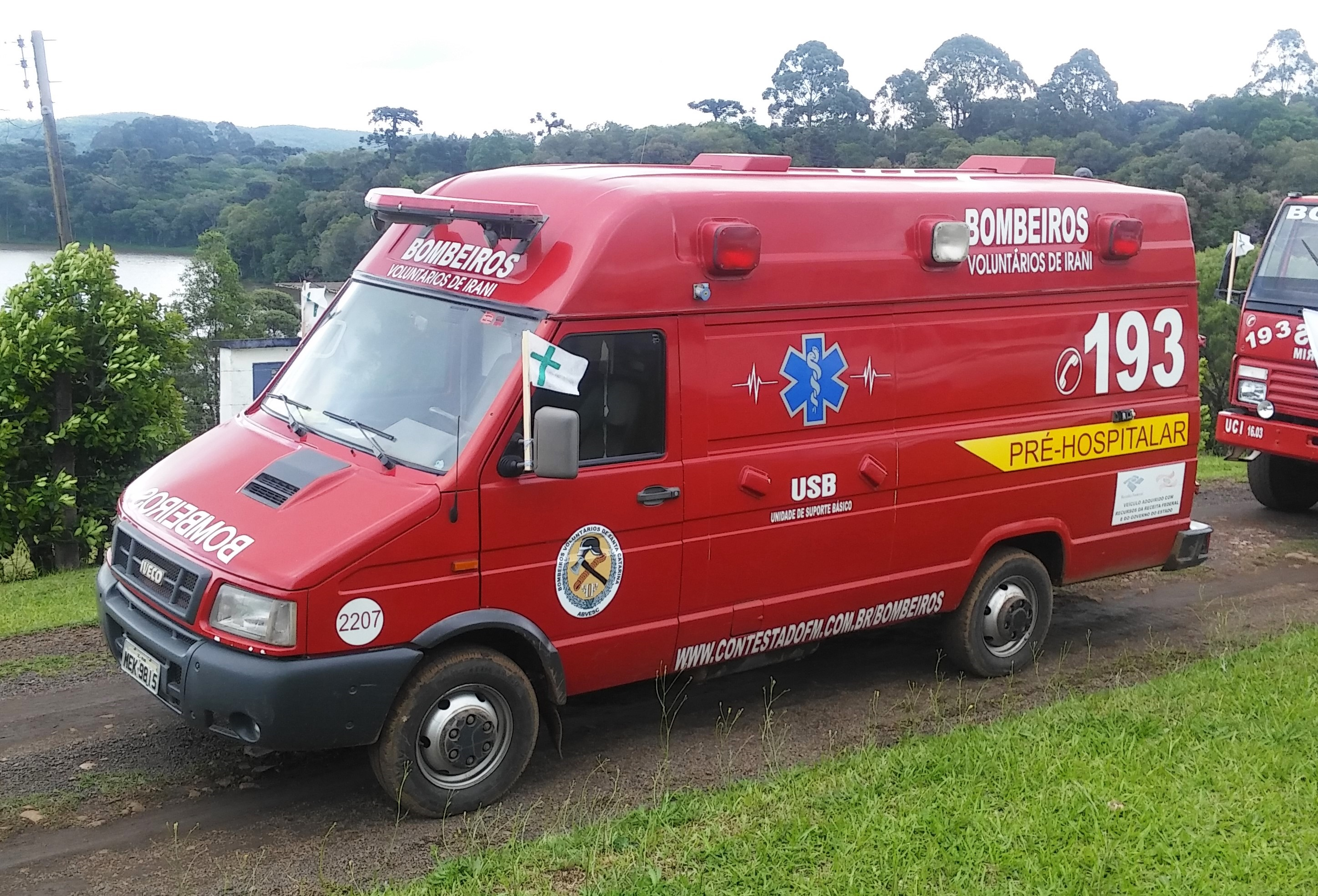 Viatura do Bombeiros Voluntários de Irani, SC.